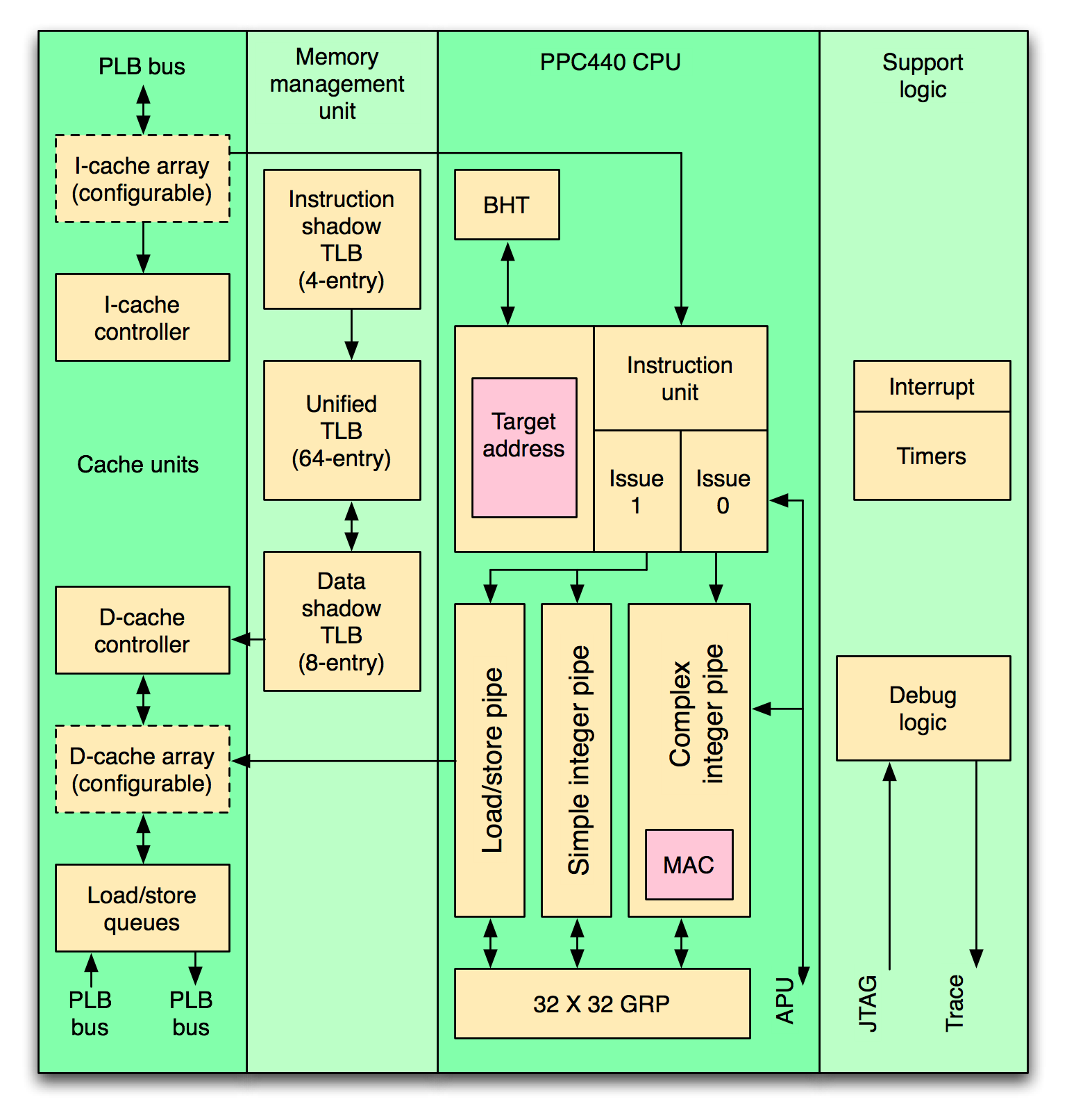 Schema PowerPC 440 (Blue Gene/L)